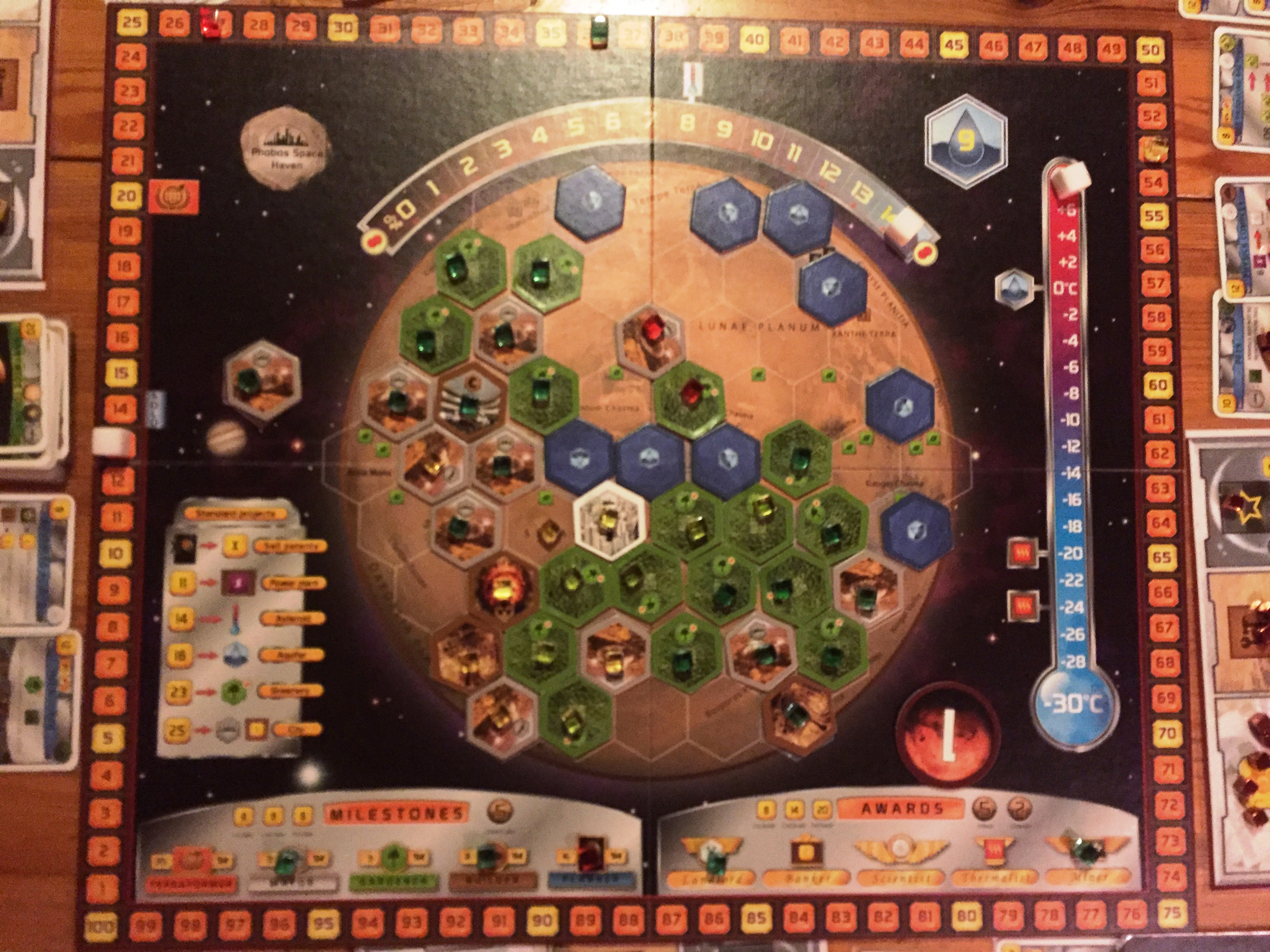 Terraforming Mars spelplan när de tre terraformingkategorierna syre, temperatur och vatten har nått sina högsta nivåer och spelet avslutas.